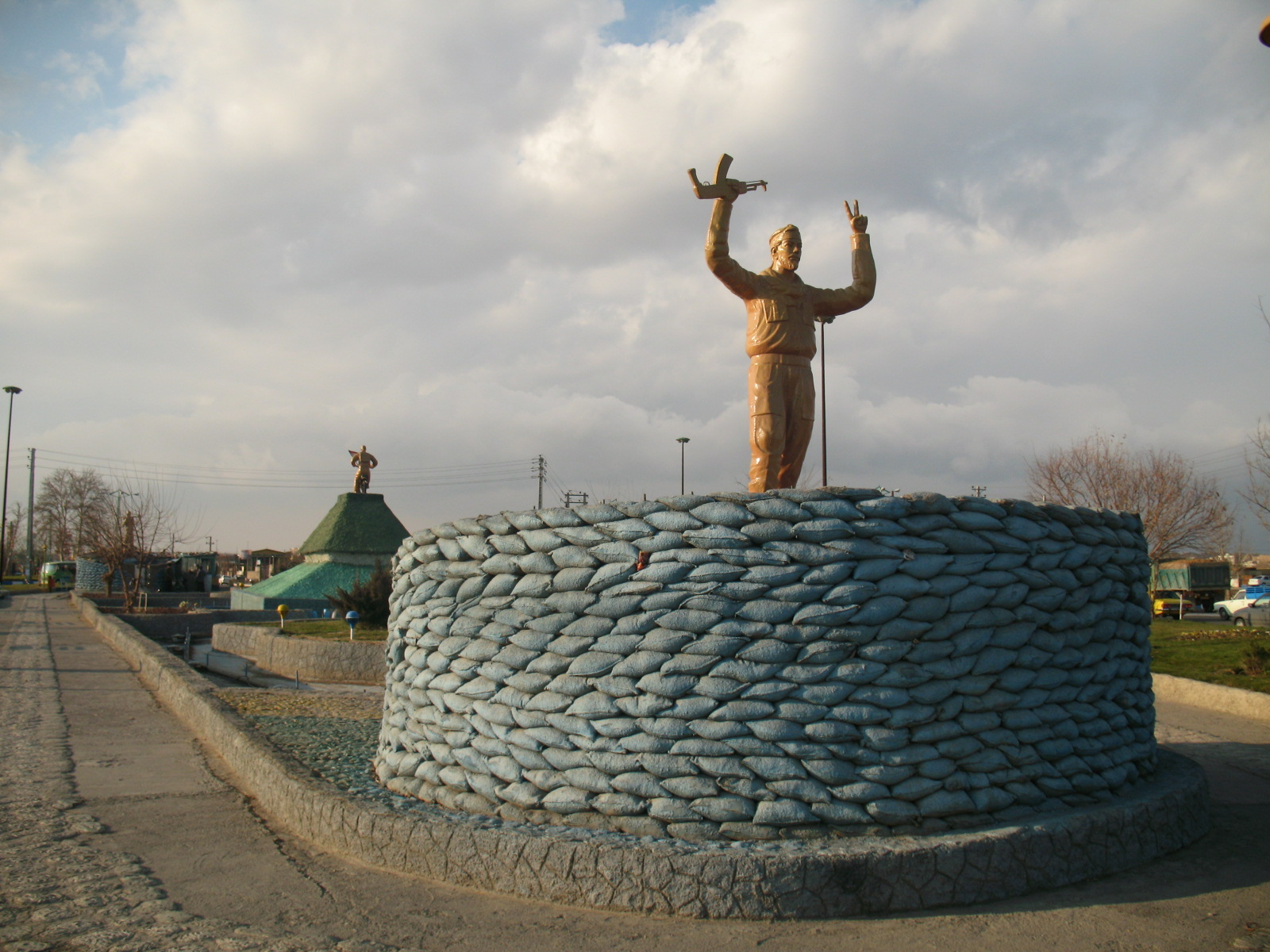 Fortress,Varamin رزمنده پیروز در سنگر